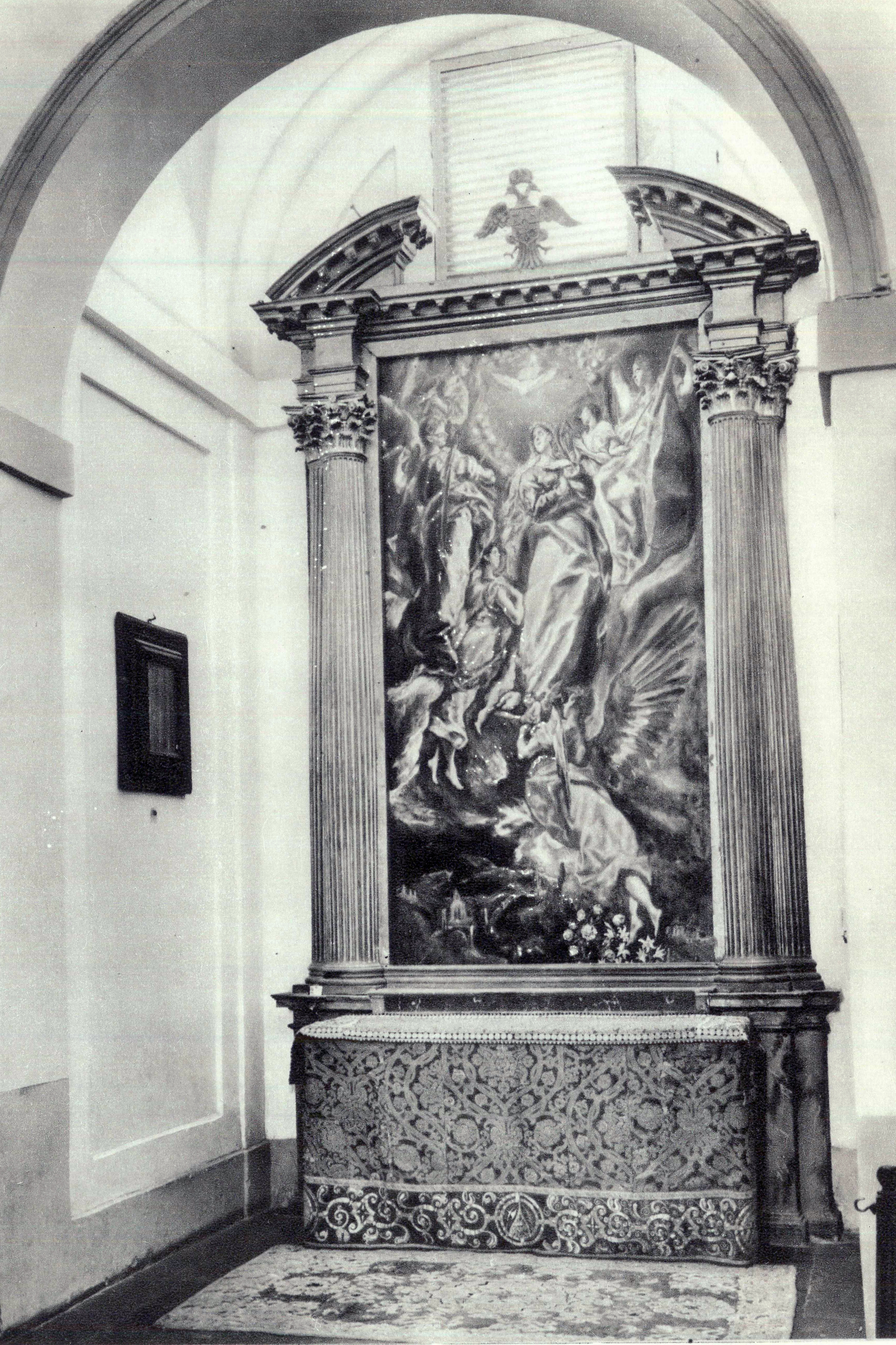 Fotografía antigua que muestra el retablo y la pintura de El Greco en la Capilla Oballe.